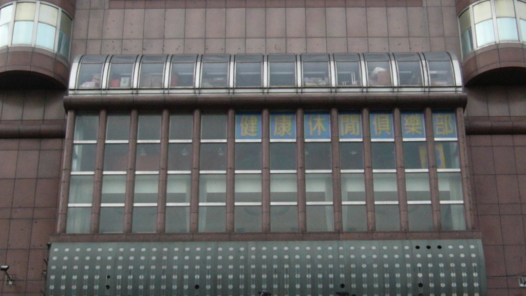 中文（台灣）: 亞洲廣場大樓6樓，亞力山大健康休閒俱樂部台北站前分部改名後的殘餘招牌。